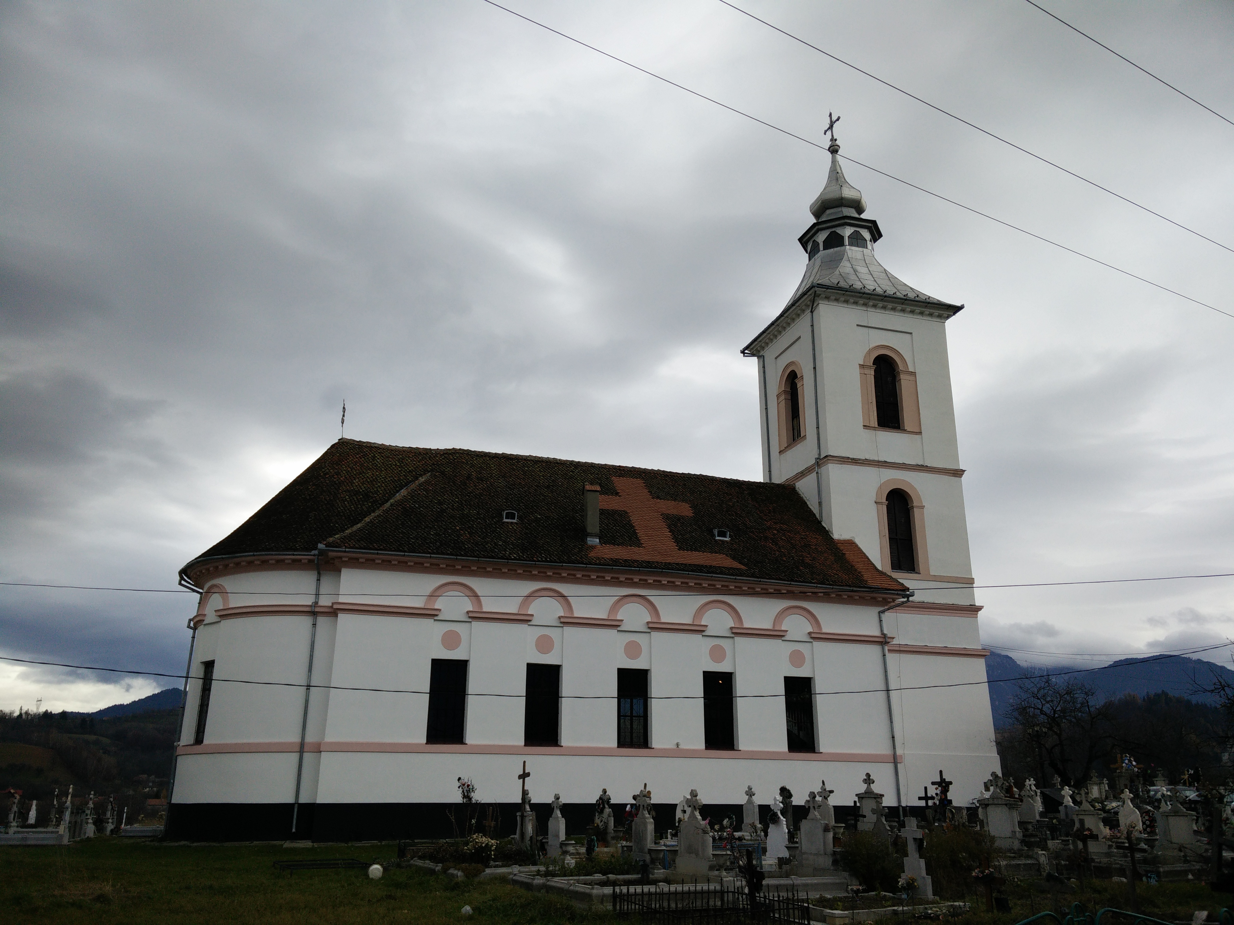 Biserica „Adormirea Maicii Domnului”